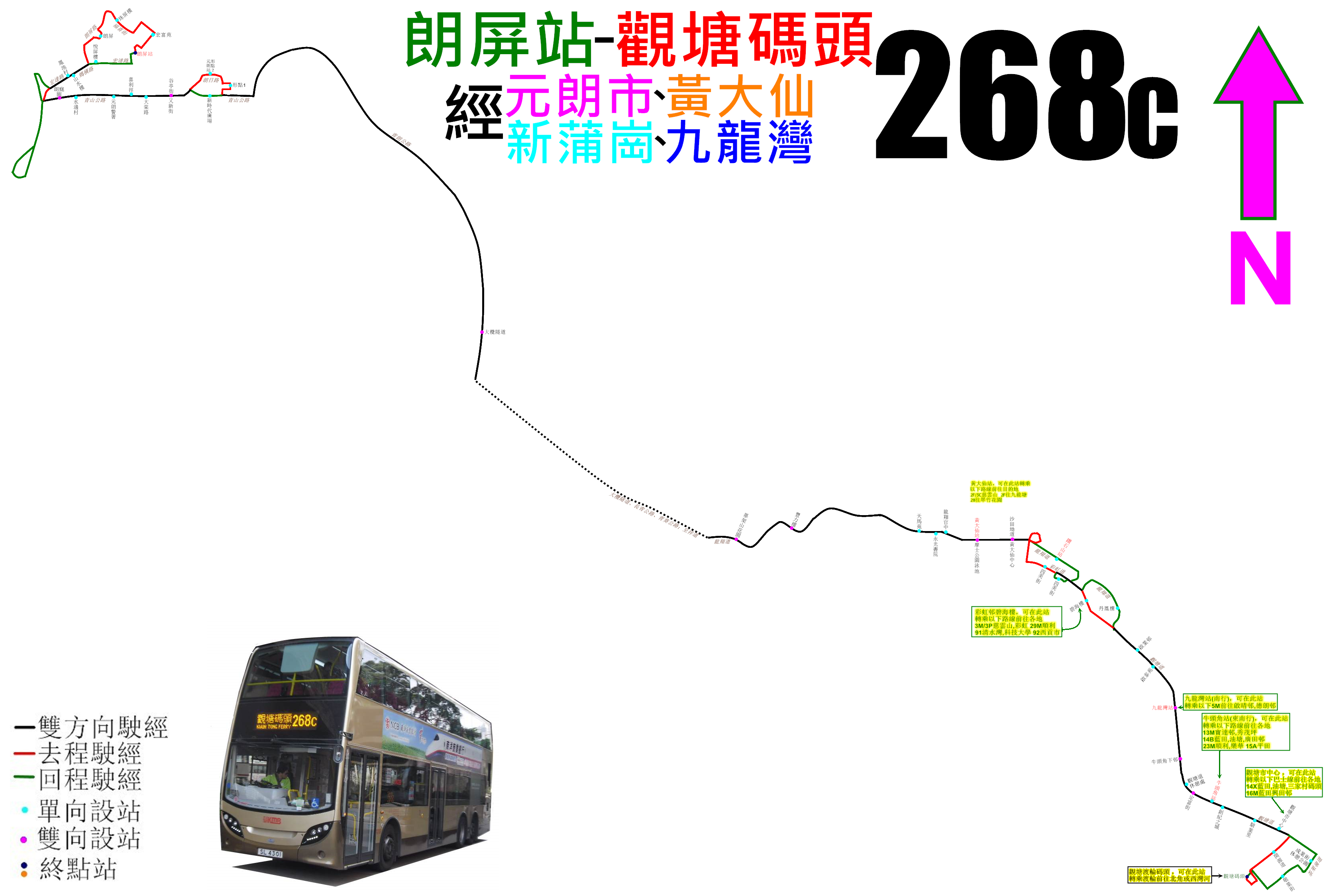 中文（香港）: 九巴268C線的走線圖